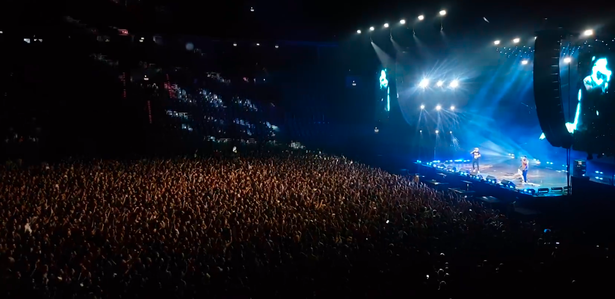 Taco Hemingway i Quebonafide na koncercie w Tauron Arena Kraków, 2018